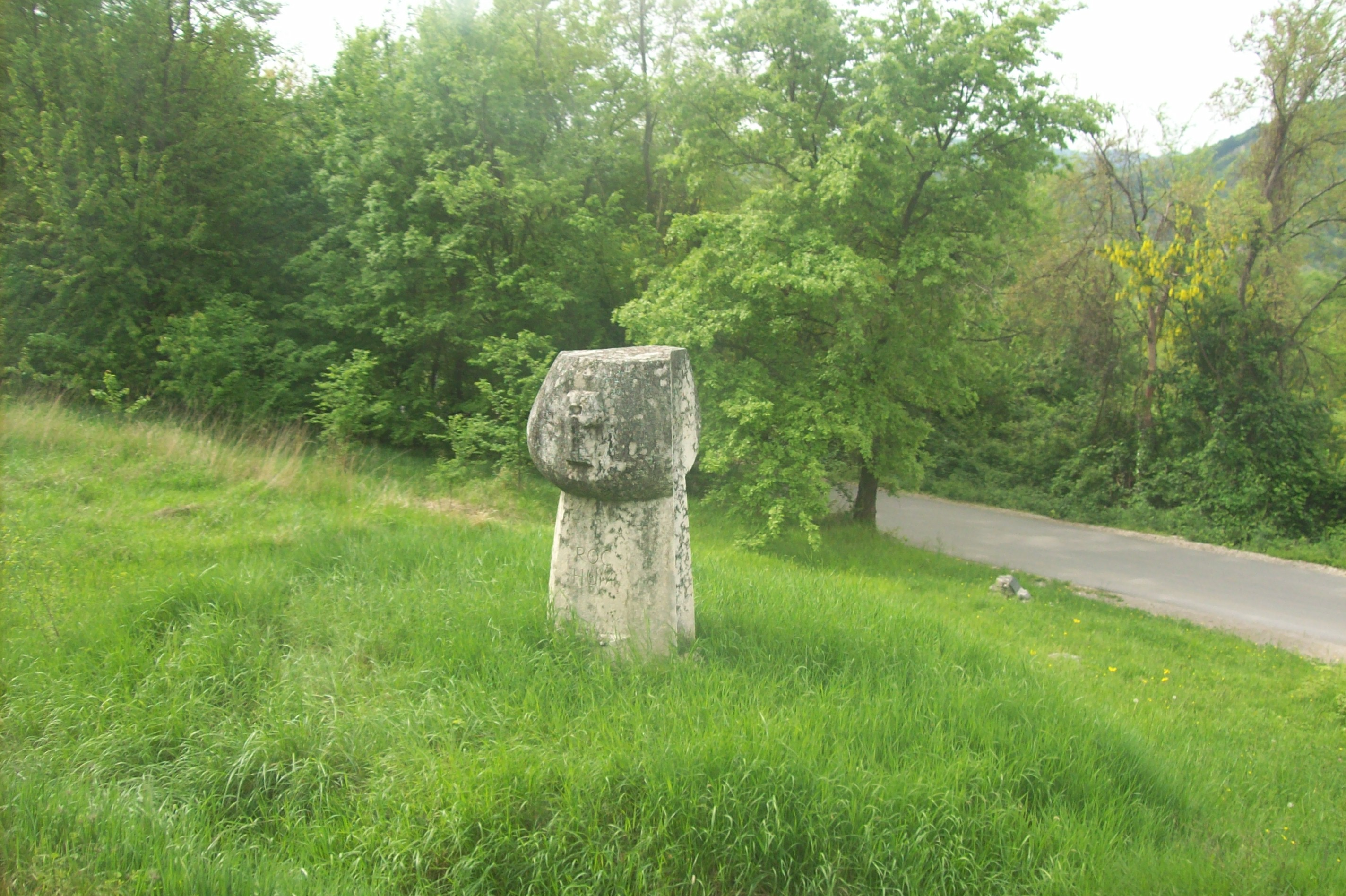 Stup Čakavskog sabora, Aleja glagoljaša, Istra, Hrvatska